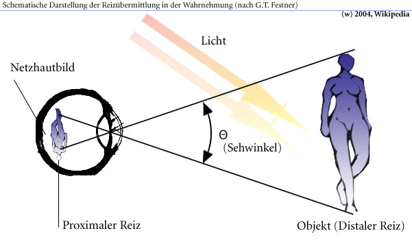 Schematische Darstellung der Reizübermittlung in der Wahrnehmung (nach G.T. Festner)